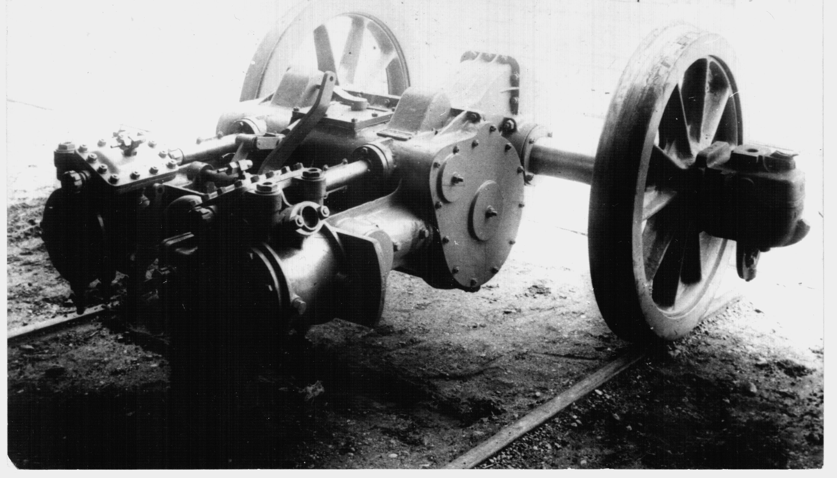 A Ganz gyár de Dion Bouton rendszerű gőzmotorkocsijának motorja és hajtóműve a hajtott tengellyel